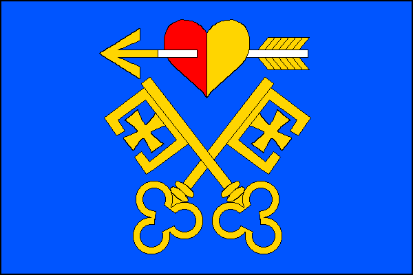 vlajka, Střelice, okres Znojmo